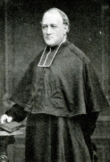 Abbé Victor Chocarne, curé à Beaune (France)